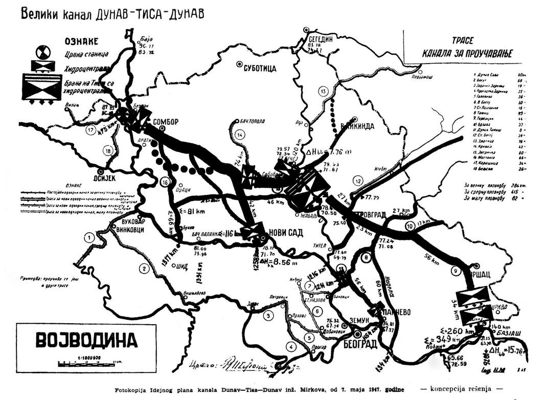 Српски (ћирилица): Никола Мирков, фотокопија идејног плана канала. Из књиге: Сабрани радови инжењера Николе Миркова; Покрајински фонд вода; Нови Сад; 1976.